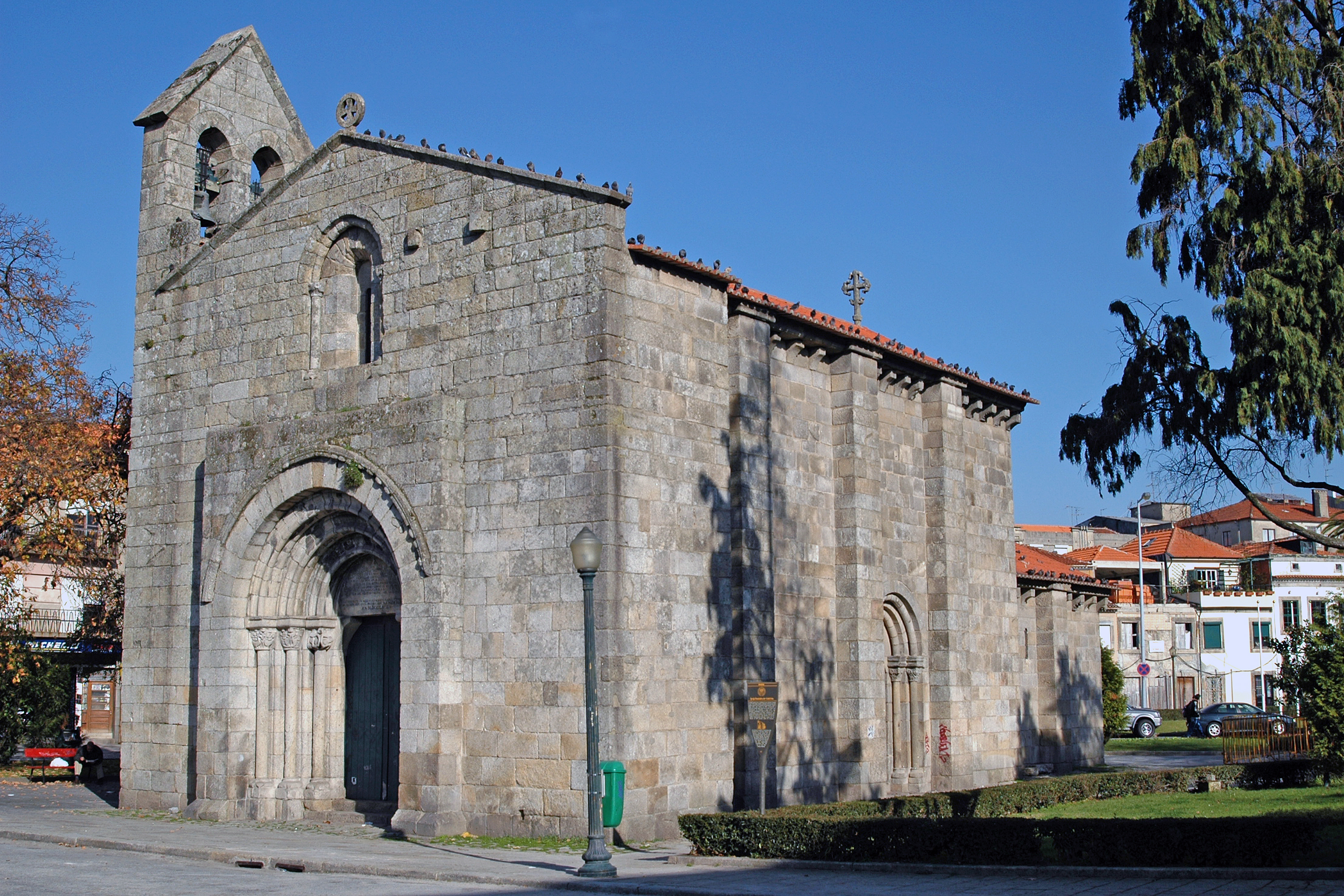 Igreja de São Martinho de Cedofeita ou Românica de Cedofeita